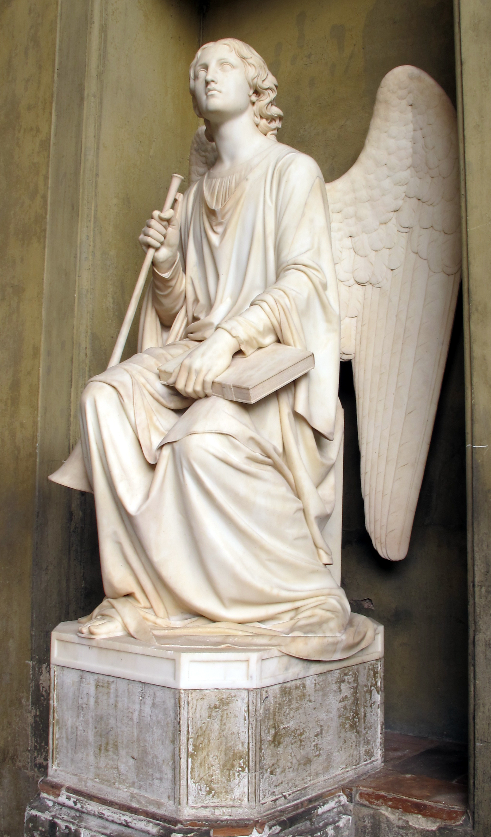 Firenze